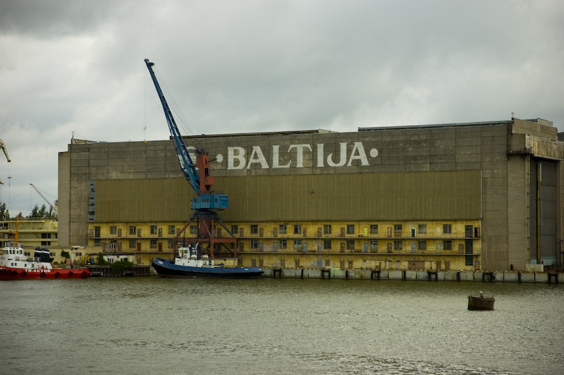 AB Baltijos Laivų Statykla (Baltija shipyard in Klaipėda, Lithuania